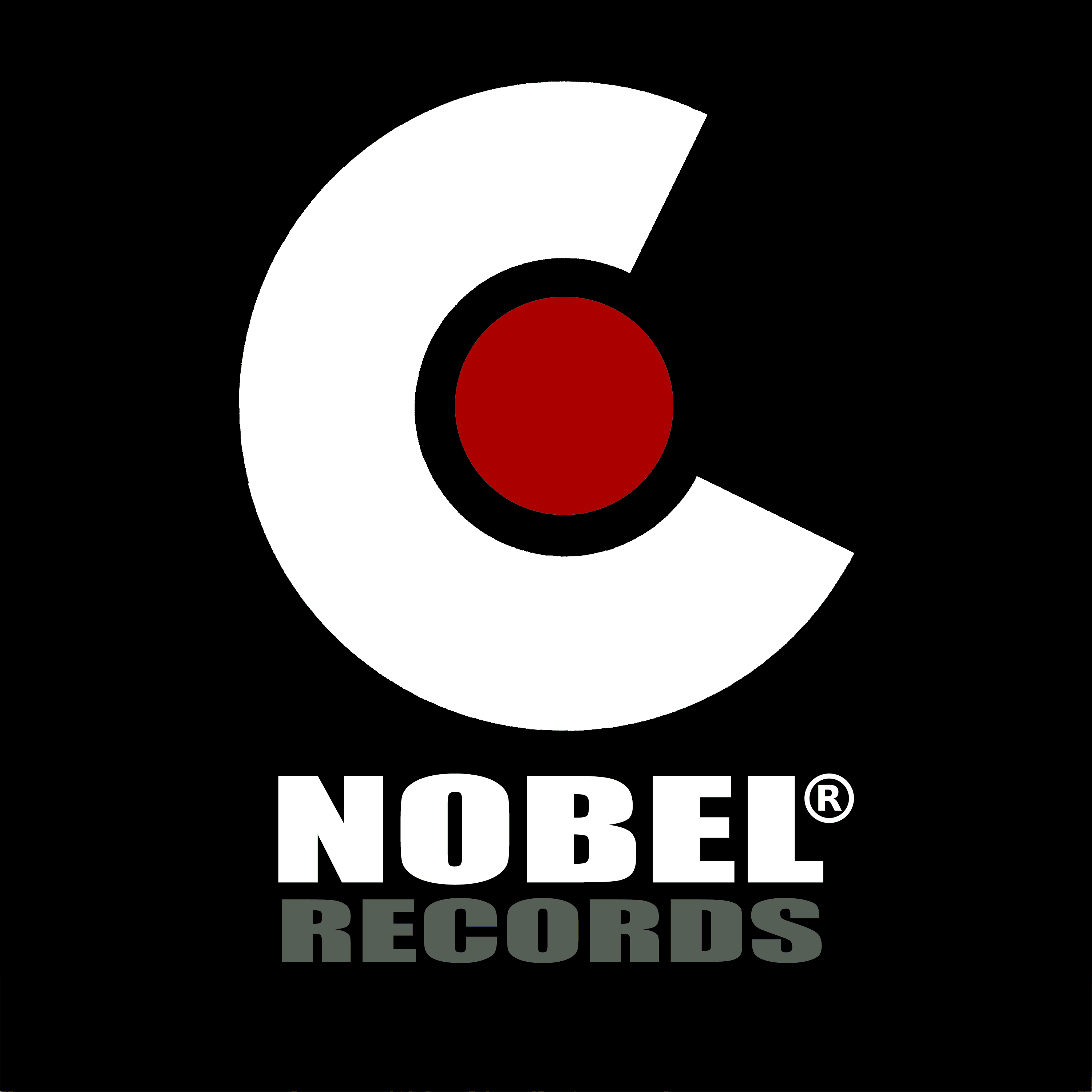 Nobel Records Logo